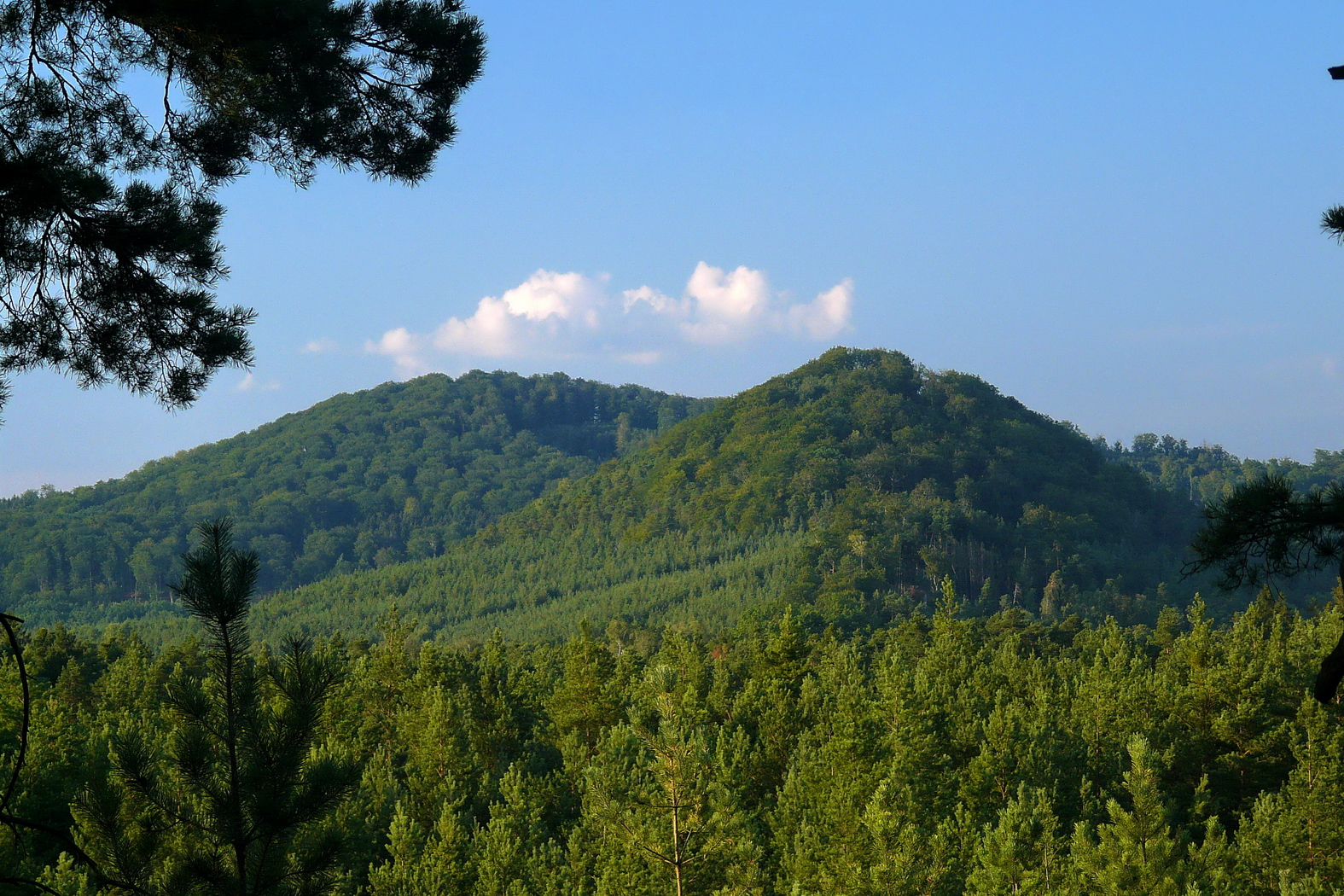 Mlýnský vrch a Pecopala z Králova stolce